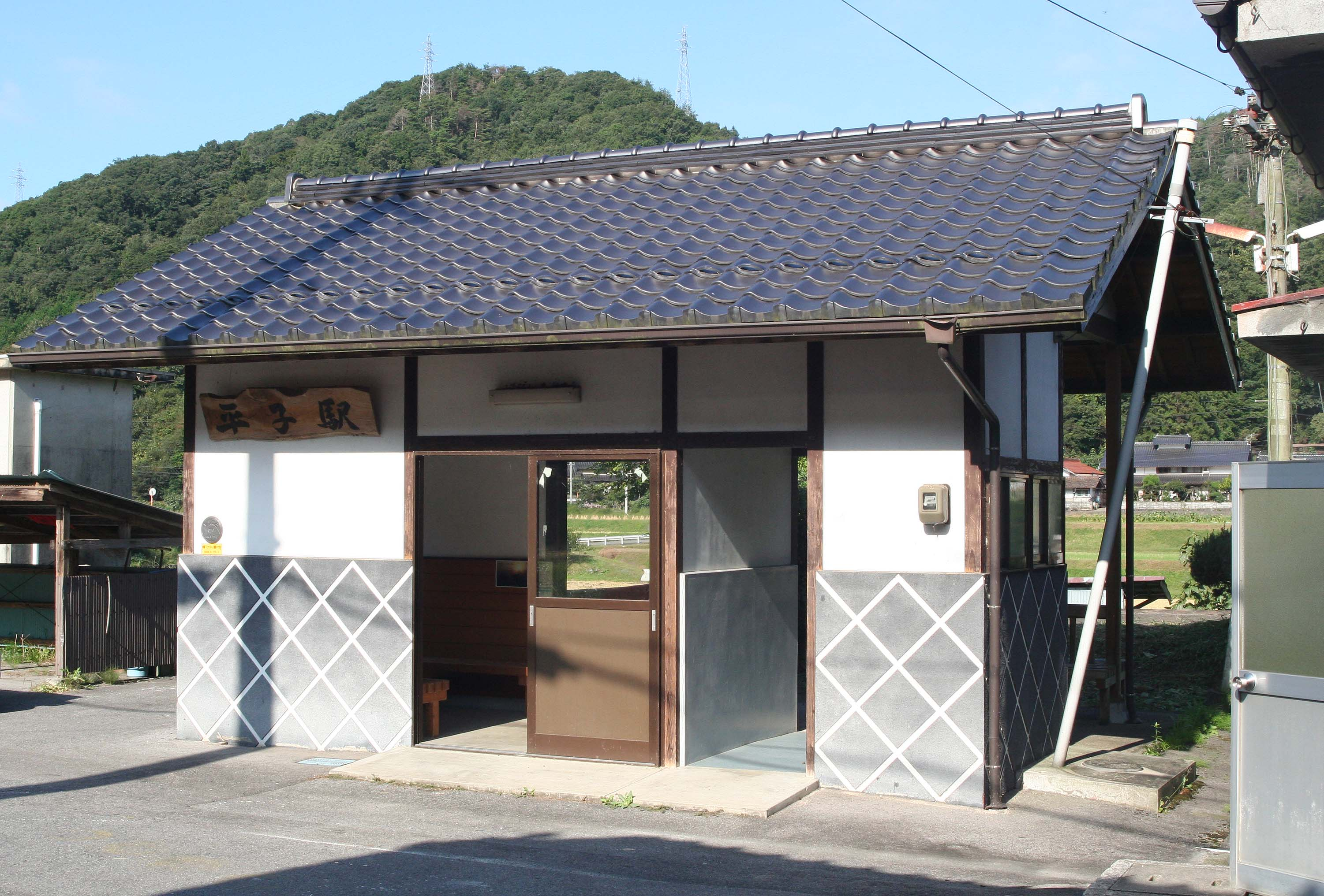 西日本旅客鉄道 平子駅の駅舎